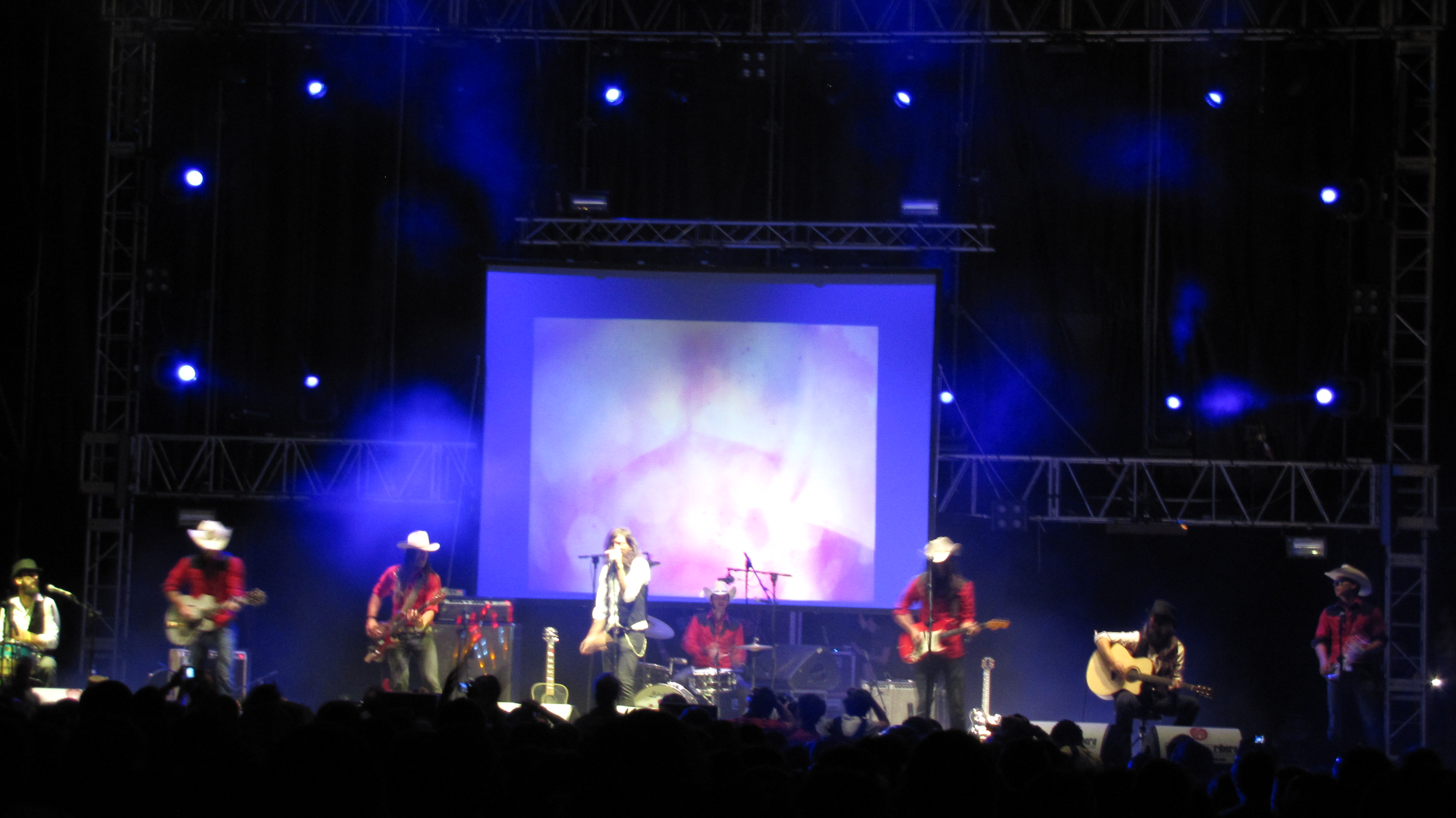 Concierto de "Dos bandas y un destino", Los Coronas y Arizona Baby, durante el Festival Sonorama 2011, en Aranda de Duero (Burgos-España)